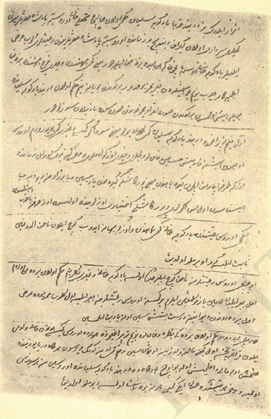 Фотокопия обязательства, принятого Кубинским ханством в 1782 г. перед Россией, о торговле. Текст обязательства написан на азербайджанском языке с приложением печати кубинского хана